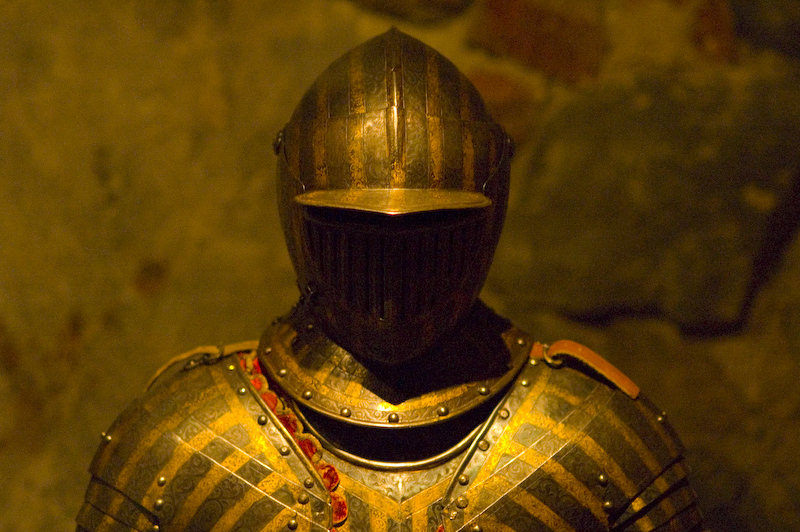 armor